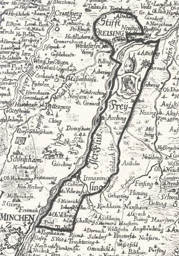 Die "Grafschaft auf dem Yserrain" im 17. Jahrhundert, Ausschnitt aus einer Karte von Georg Philipp Finckh (1663 - 1671), Bayerisches Hauptstaatsarchiv.